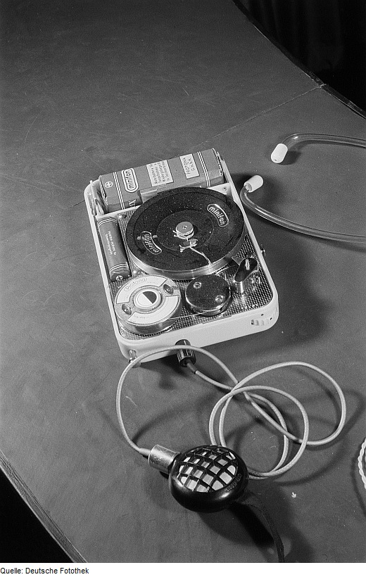 Original image description from the Deutsche Fotothek Ein Aufnahmegerät Minifon der Firma Protona mit Mikrofon